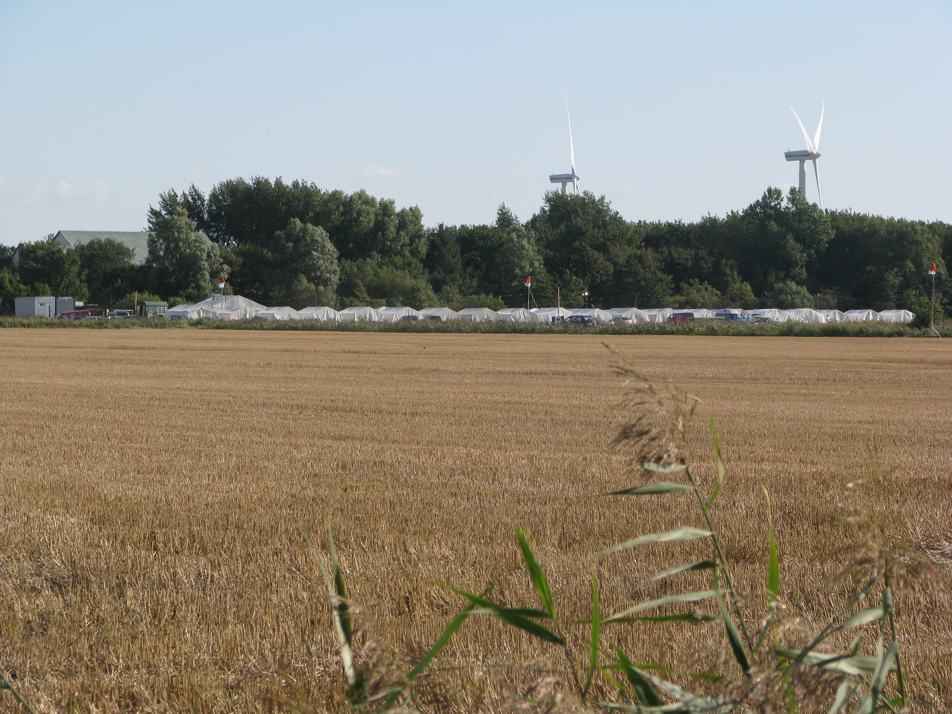 Ein sich alljährlich zweimal wiederholendes Bild - Die Zeltstadt im Sophien-Magdalenen-Koog dient den Handball-Amateuren des NF-Cup als nächtliches Übernachtungsquartier